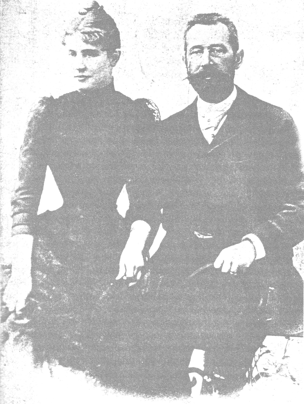 Zakladateľ Nového Smokovca Miikuláš Szontagh s manželkou